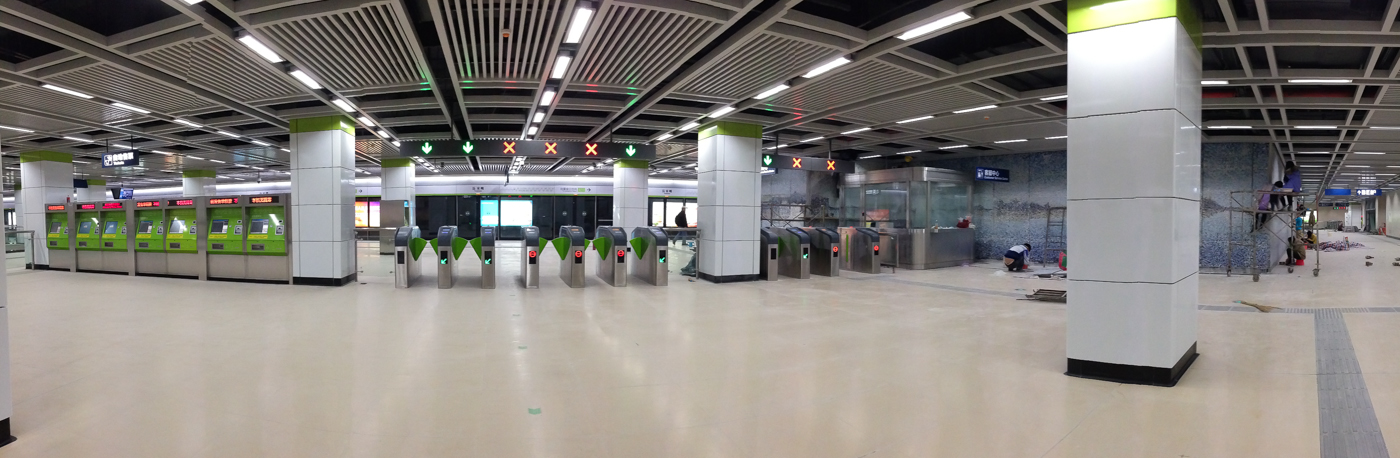 中文（中国大陆）: 武汉地铁4号线岳家嘴侧式站台(北站厅)全景